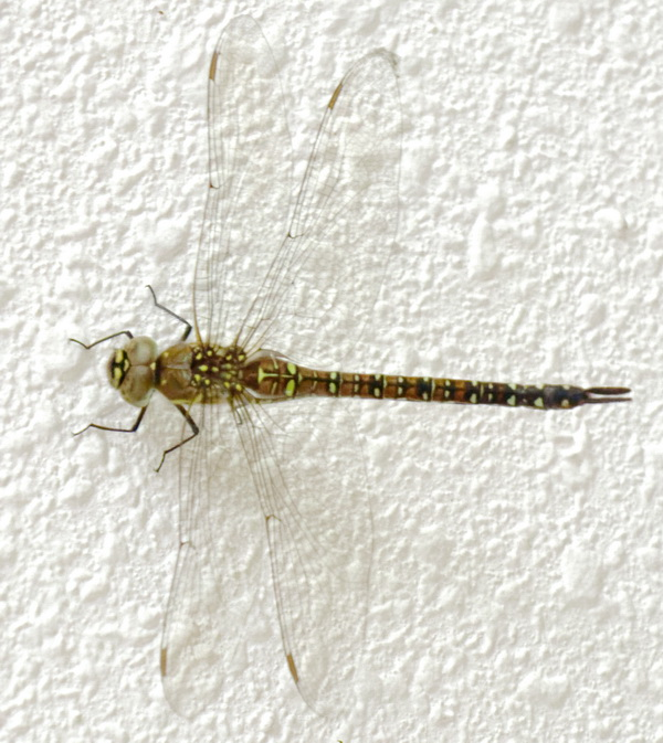 Vrouwtje van de venglazenmaker, Soest 2018